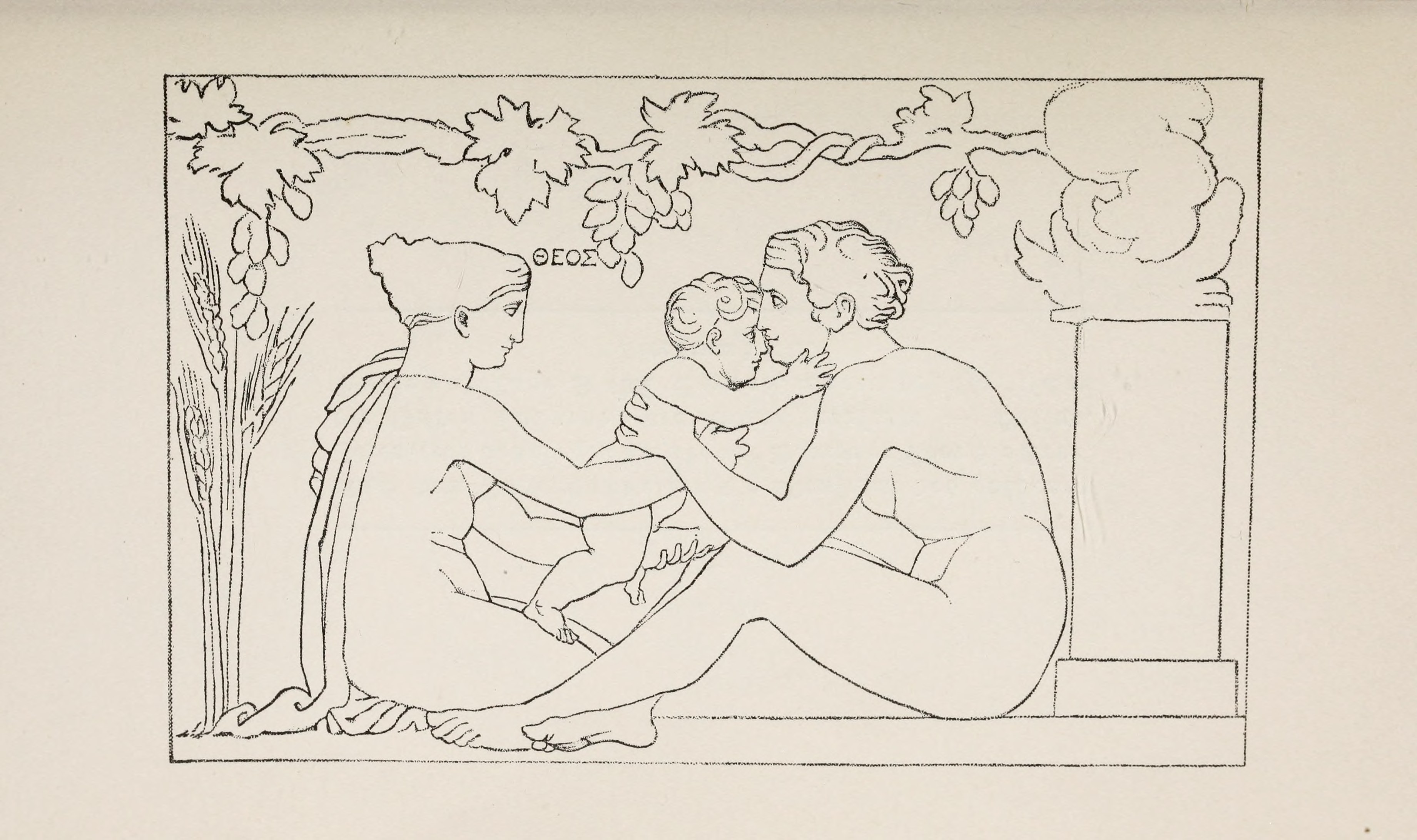 Das Lied von den Zeitaltern: Das goldene Zeitalter. Die Menschen leben ein seliges Leben den Göttern gleich. – Hesiod, Werke und Tage V. 112. Schwab, Sagen des klassischen Altertums I. 7.